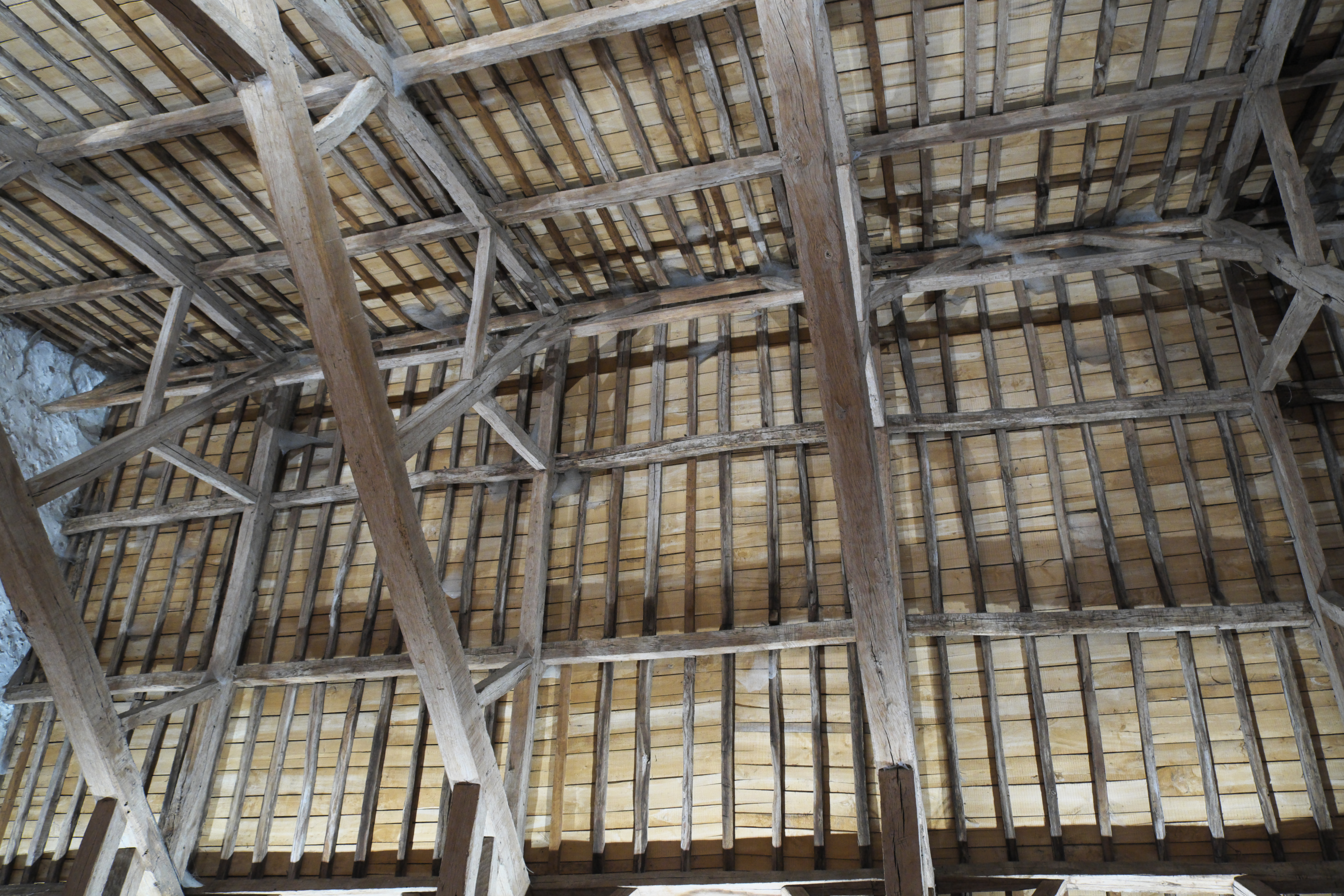 Zehntscheune (Grange aux dîmes) in Samoreau im Département Seine-et-Marne (Île-de-France/Frankreich)